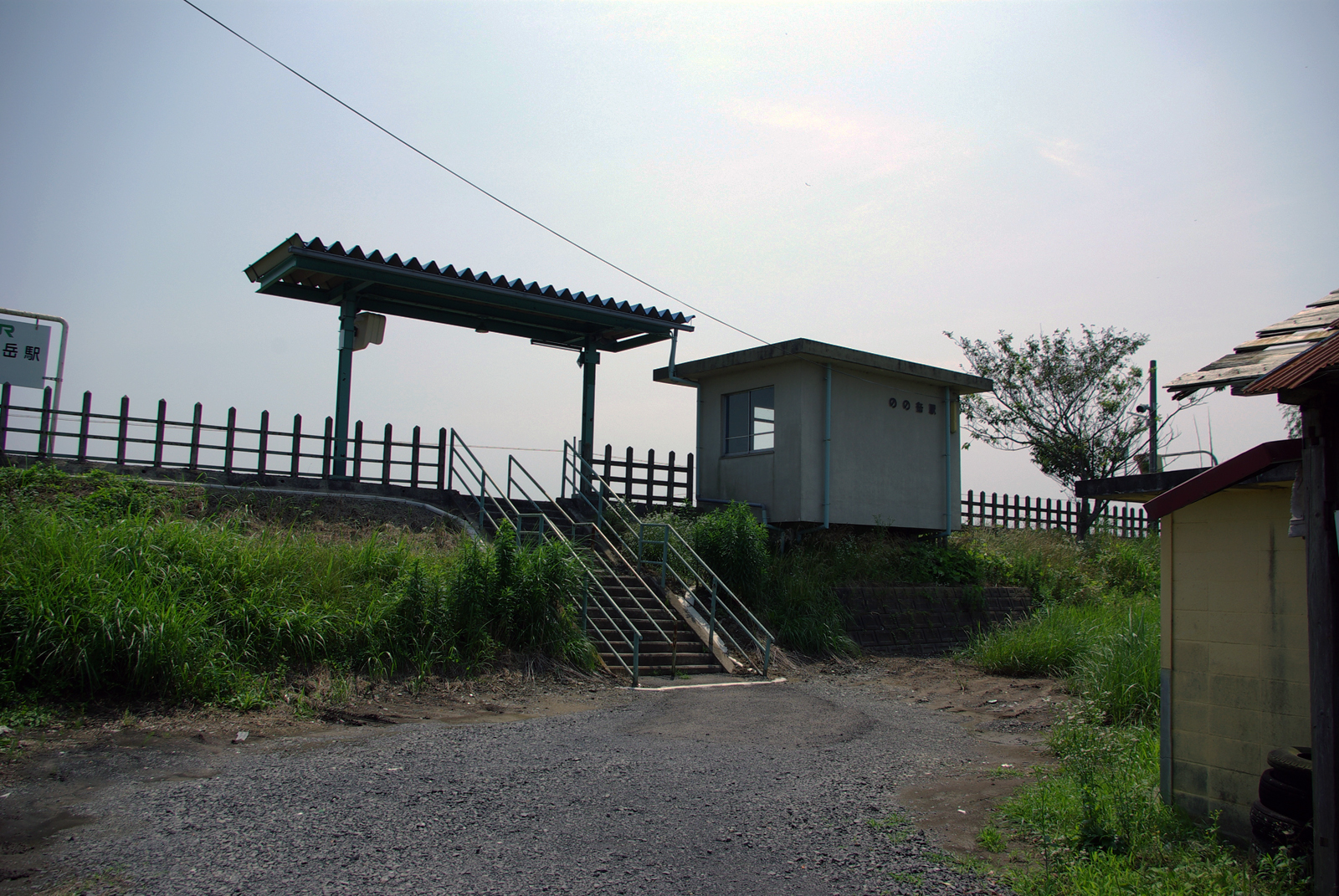 JR気仙沼線のの岳駅